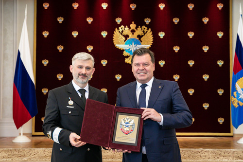 Коллектив Российского профсоюза моряков награжден памятным знаком «В ознаменование 210-летия транспортного ведомства и транспортного образования».